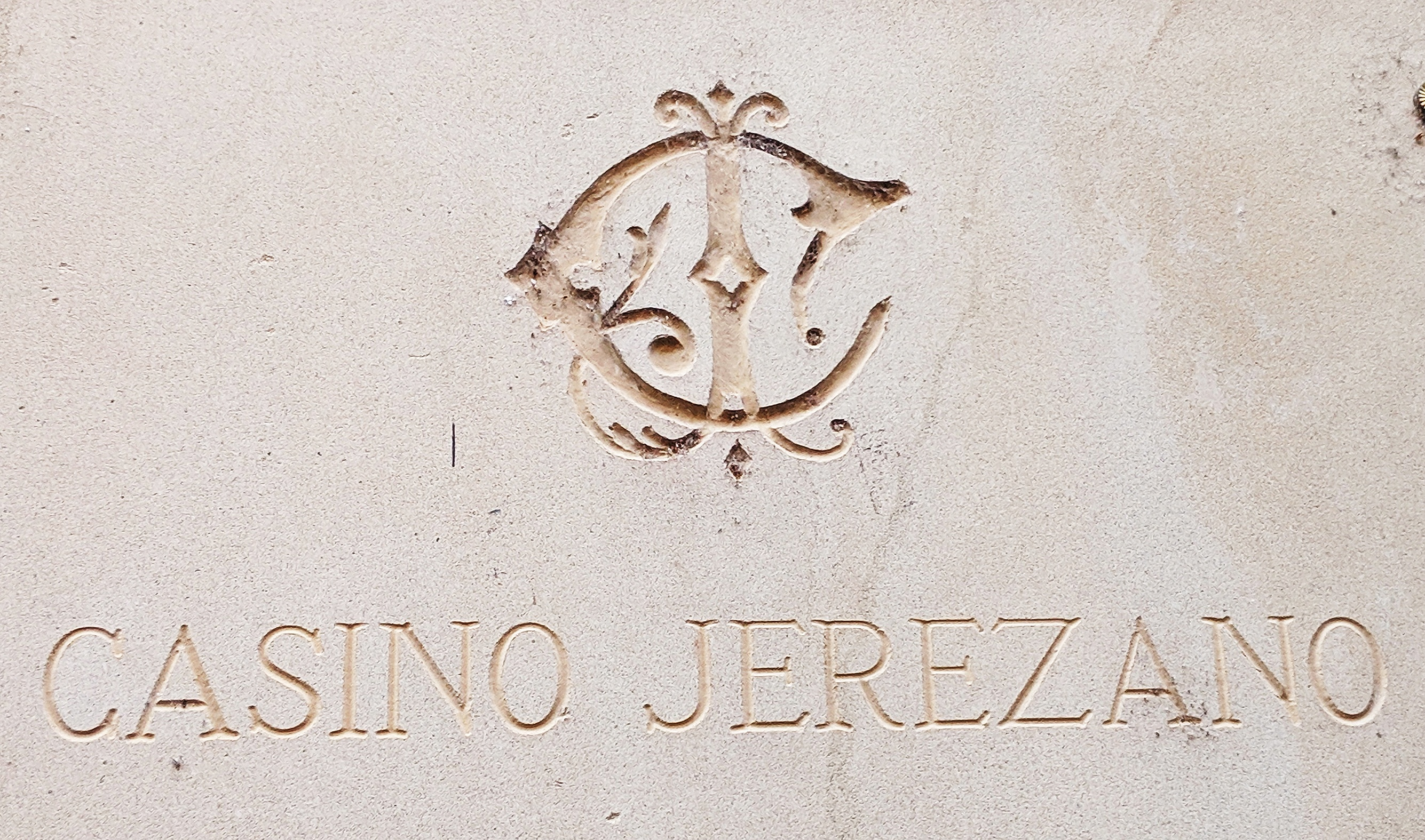 Casino Jerezano. Fundado en 1850. Jerez de la Frontera (Cádiz)